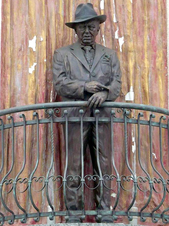 cropped from Gozon Gyula.jpg